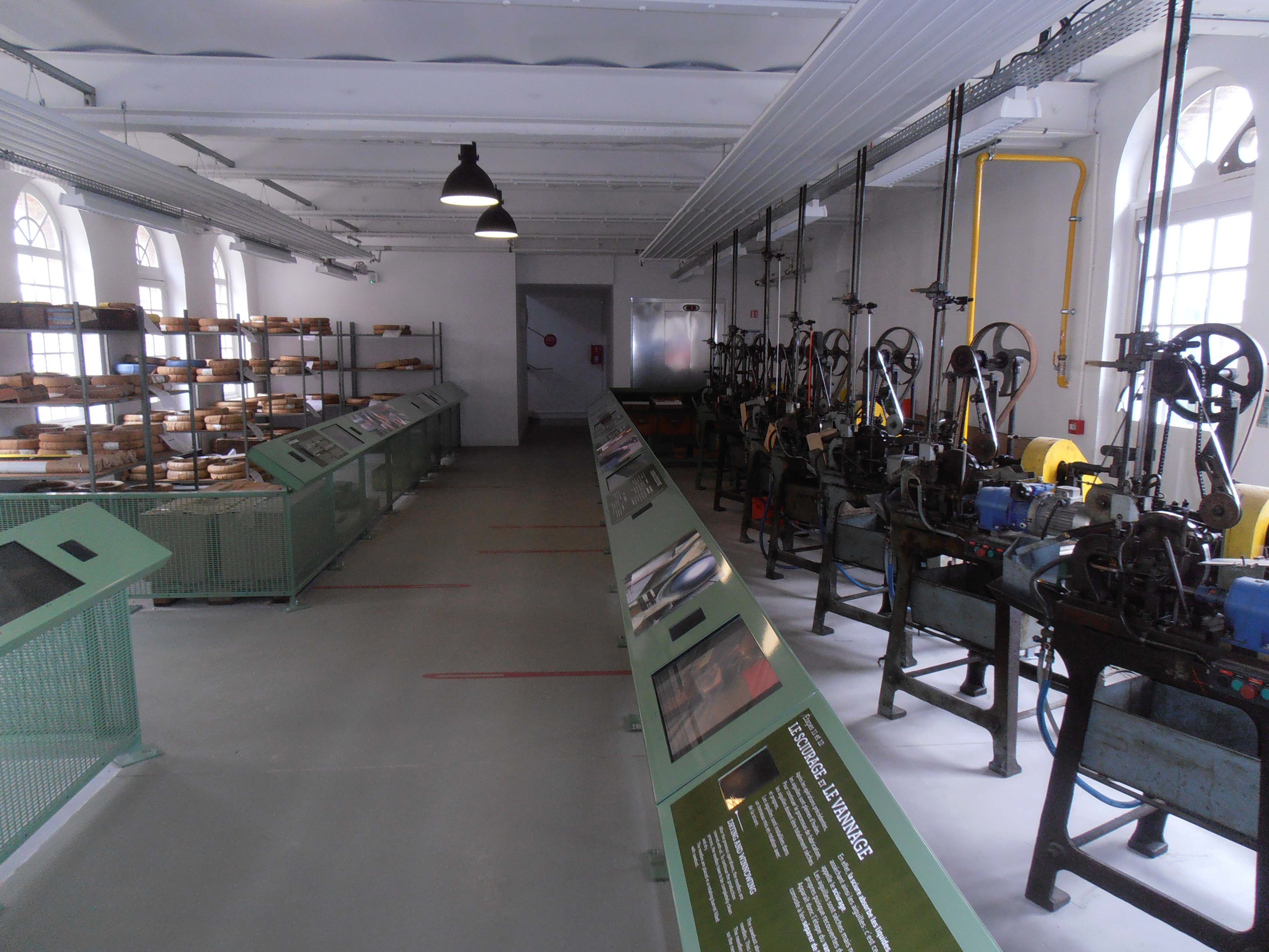 Orne, Saint-Sulpice-sur-Risle, La partie muséographique de la Manufacture Bohin : Des machines dans le parcours muséographique : Visites guidées des ateliers de production pour les groupes. Le samedi, dimanche et jours fériés et du 5 au 22 août, du fait qu'il n'y a pas de salariés dans les ateliers, des moniteurs vidéo montrent l'activité.